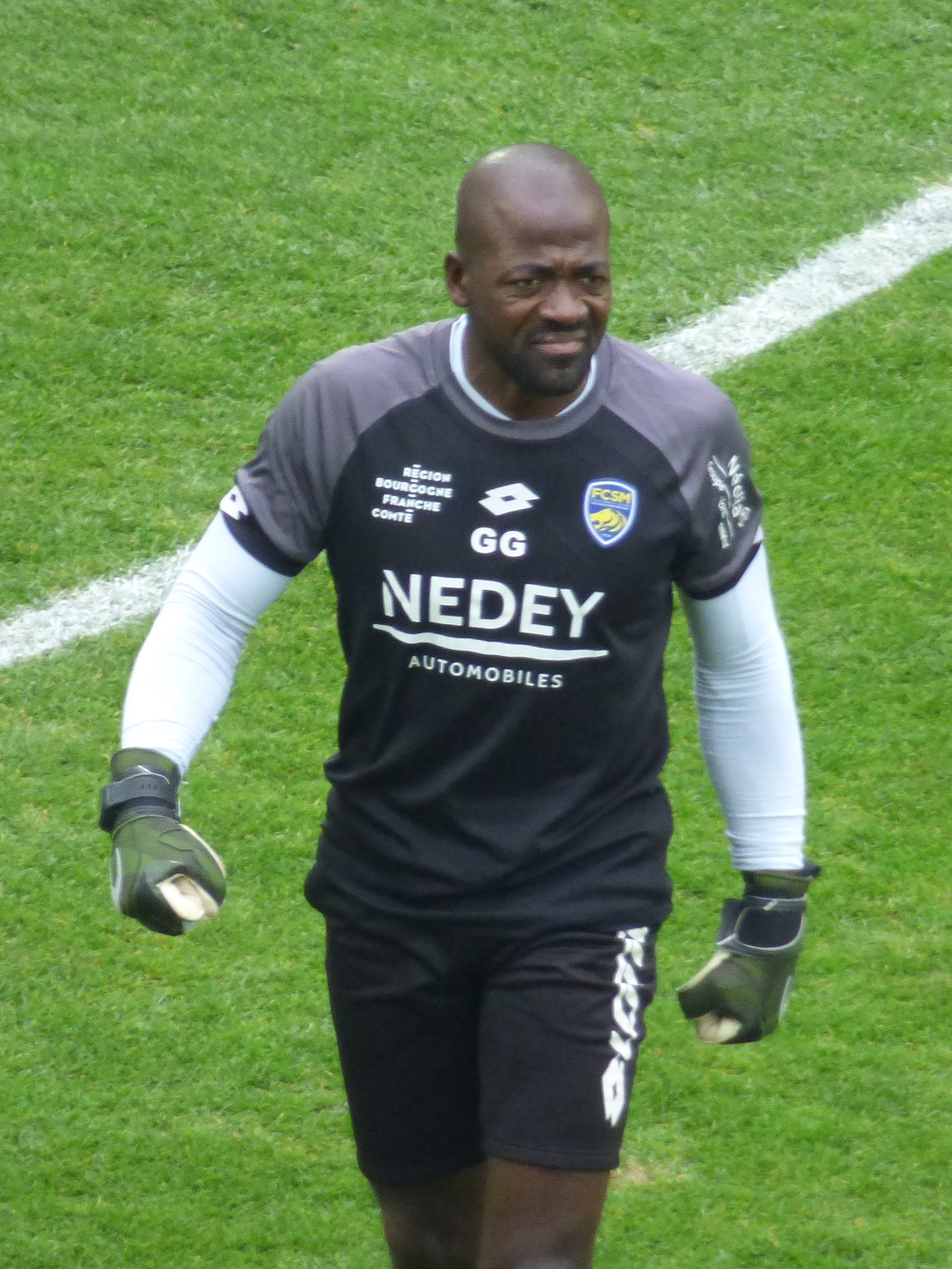 Gérard Gnanhouan avant le match RC Lens / FC Sochaux, comptant pour la quinzième journée du championnat de France de Ligue 2 de football 2019-2020, le 23 novembre 2019, au Stade Bollaert-Delelis.